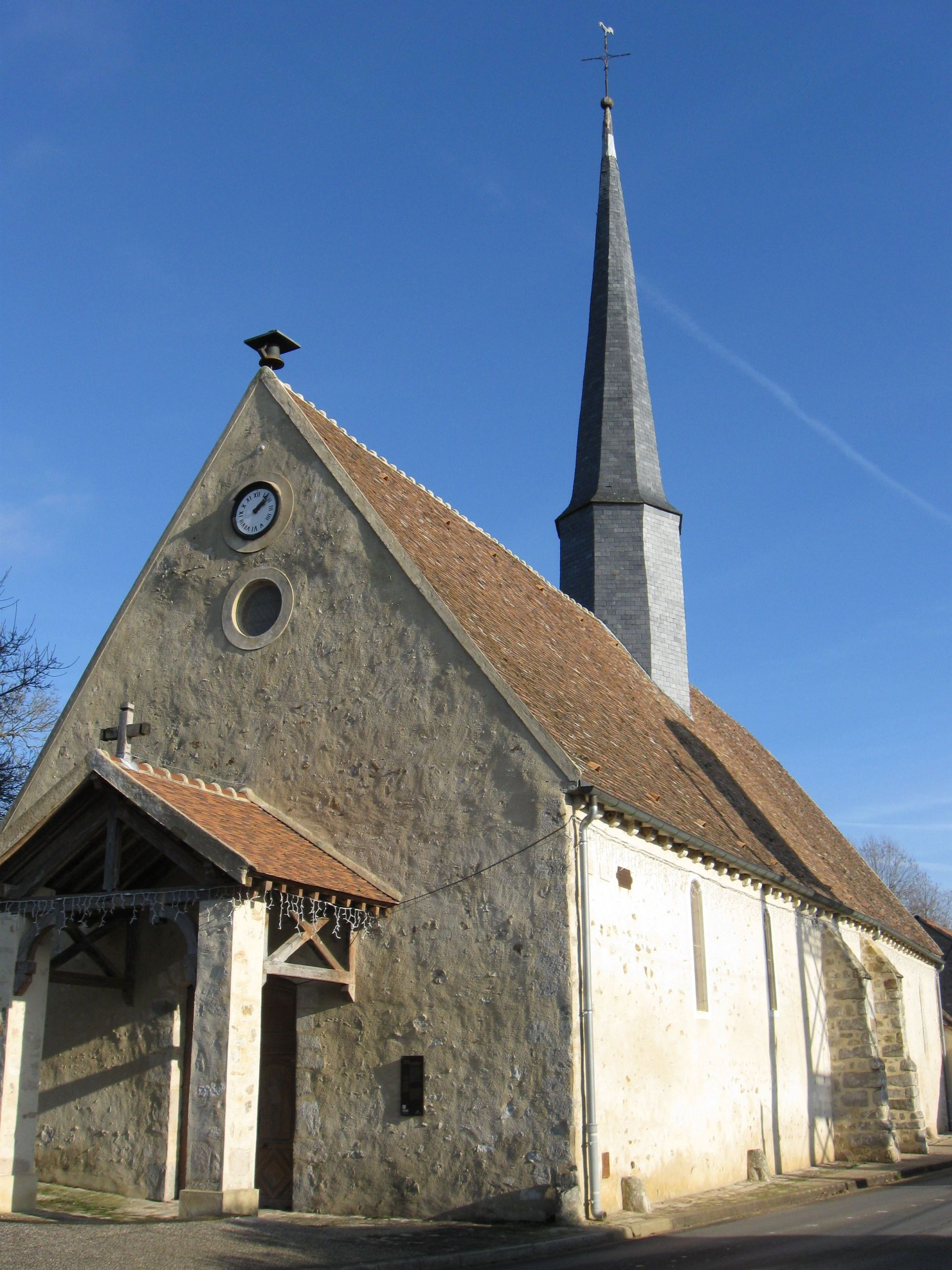 Église de l'Assomption à Barbey. (Seine et Marne, région Île-de-France).